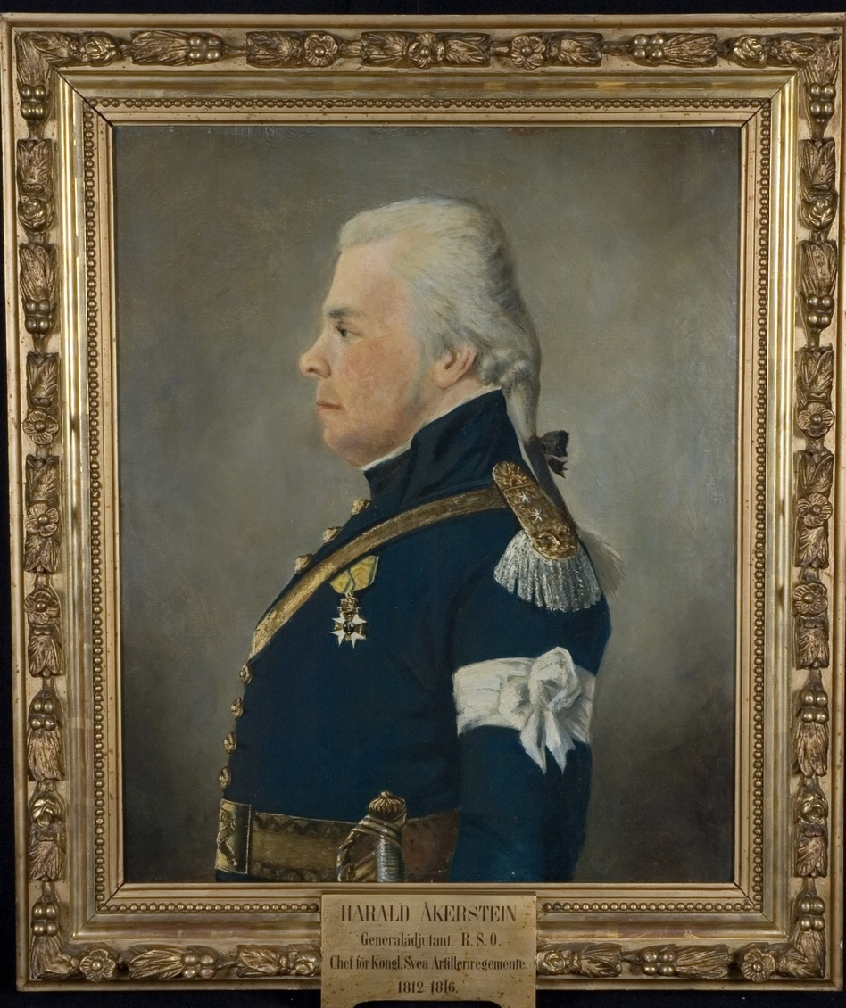 Porträtt av Harald Åkerstein (1755-1816) iklädd uniform m/1792 för artilleriet. Han bär epåletter för en överstelöjtnant. På bröstet syns Svärdsorden. Åkerstein blev överstelöjtnant 1795 och fick Svärdsorden 1794 och tjänstgjorde vid Svea artilleriregemente 1800-1806. Sedan blev han överste och chef för Finska artilleriregementet 1806-1811 och chef för Svea artilleriregemente 1812-1816. Han är här avbildad som överstelöjtnant vid Svea artilleriregemente.